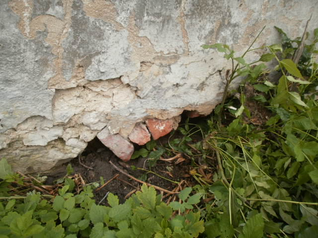 Kasti mõisa idaseina vundamendis olev tellistest võlv - kaarsillus.